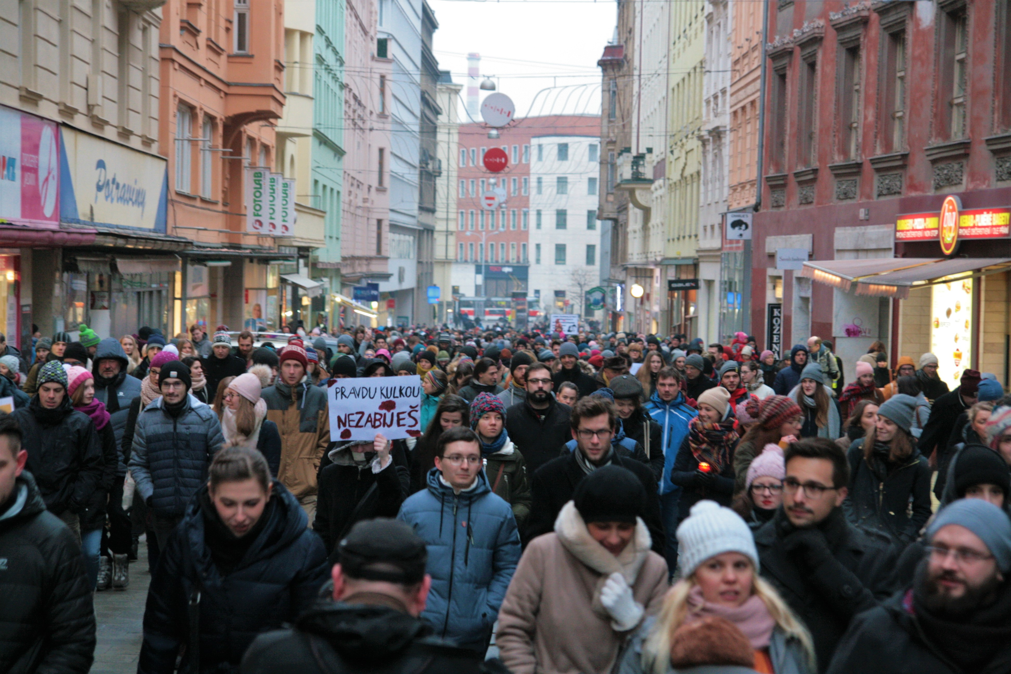 Nechceme zpět 90. léta! Pochod za Jána a Martinu v Brně z Malinovského náměstí Kobližnou ulicí na náměstí Svobody.([1],[2],[3])